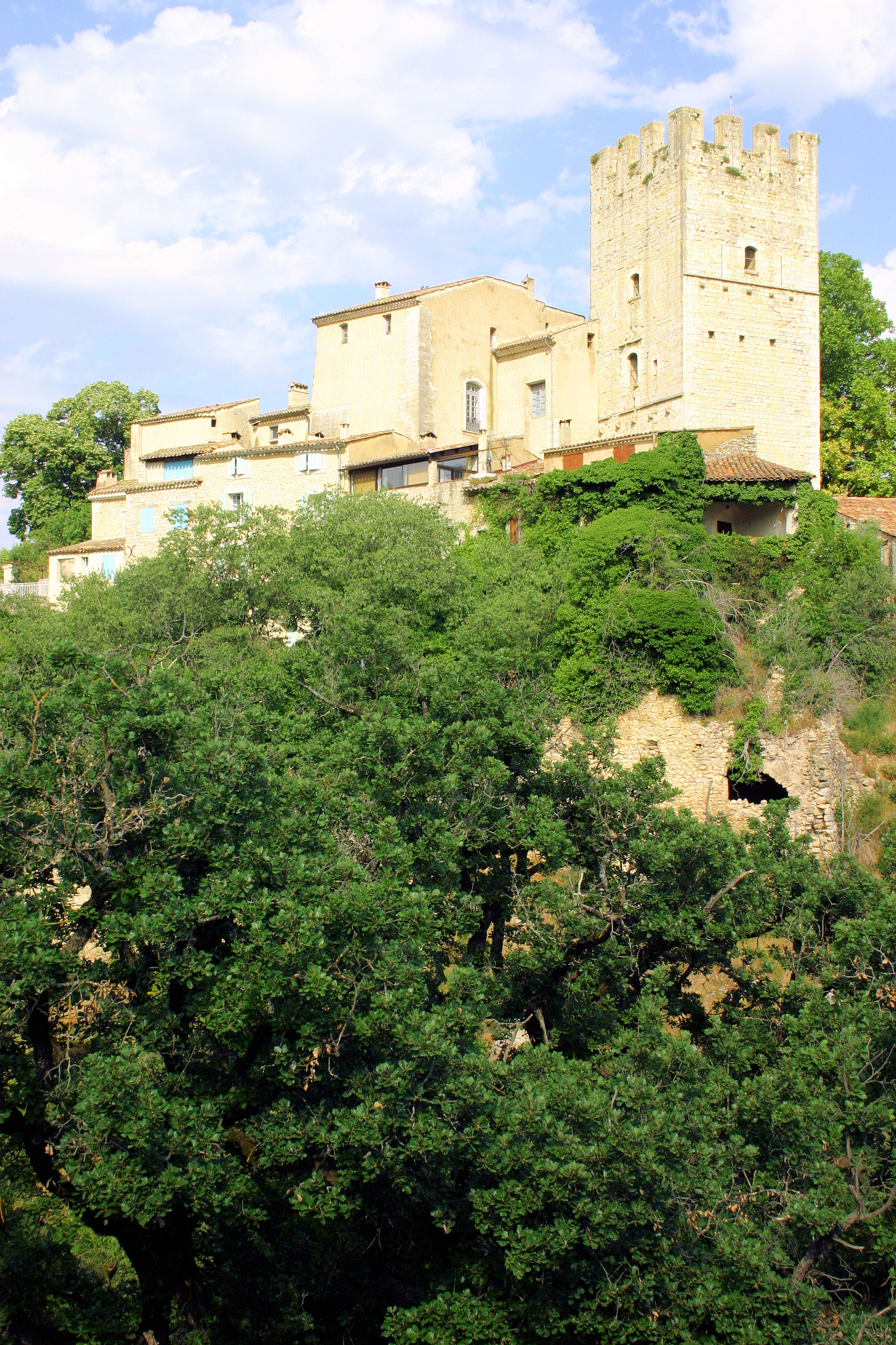 L'église d'Esparron de Verdon